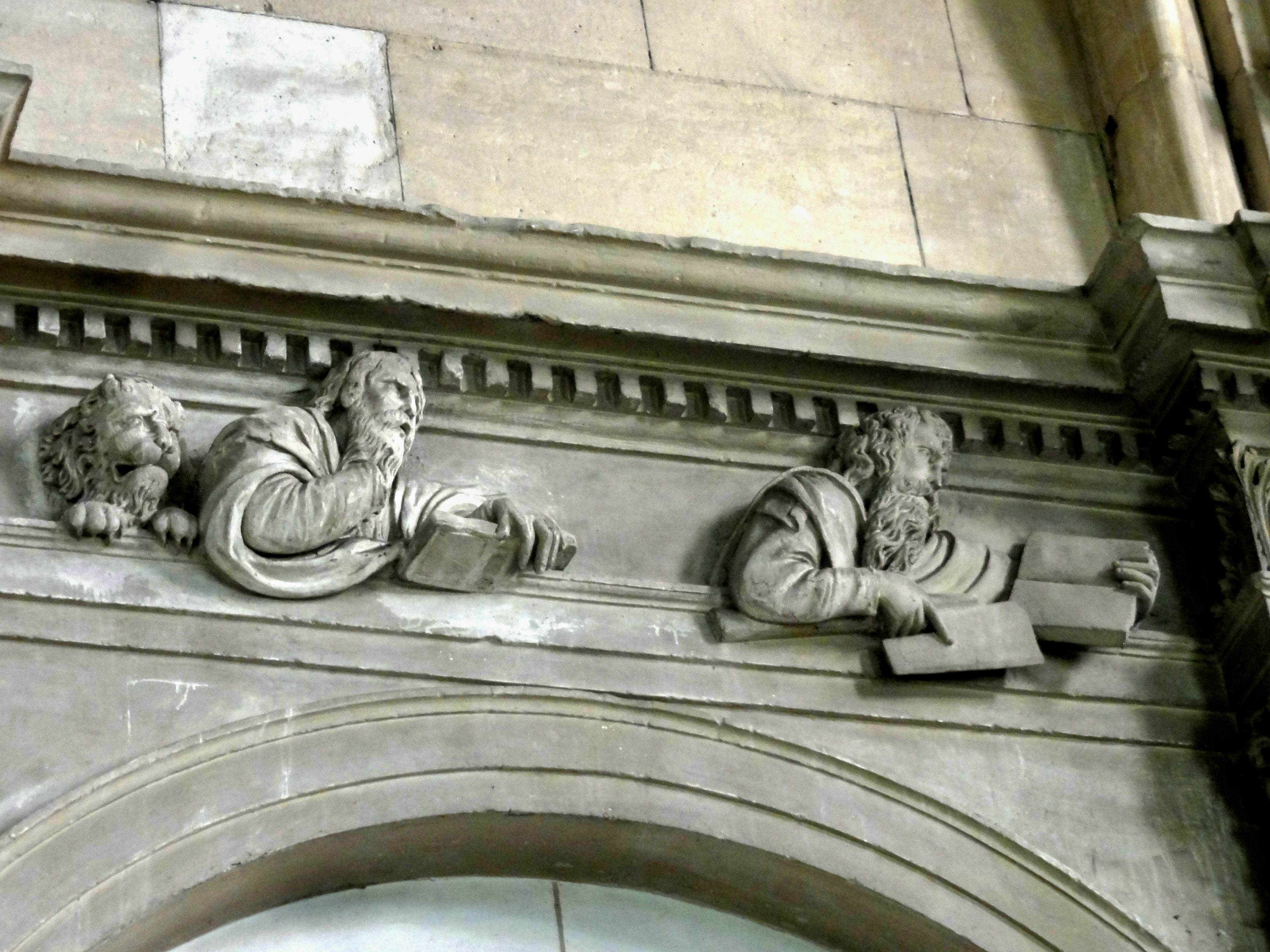 Frise des Apôtres : saint Marc et saint Matthieu (évangélistes).